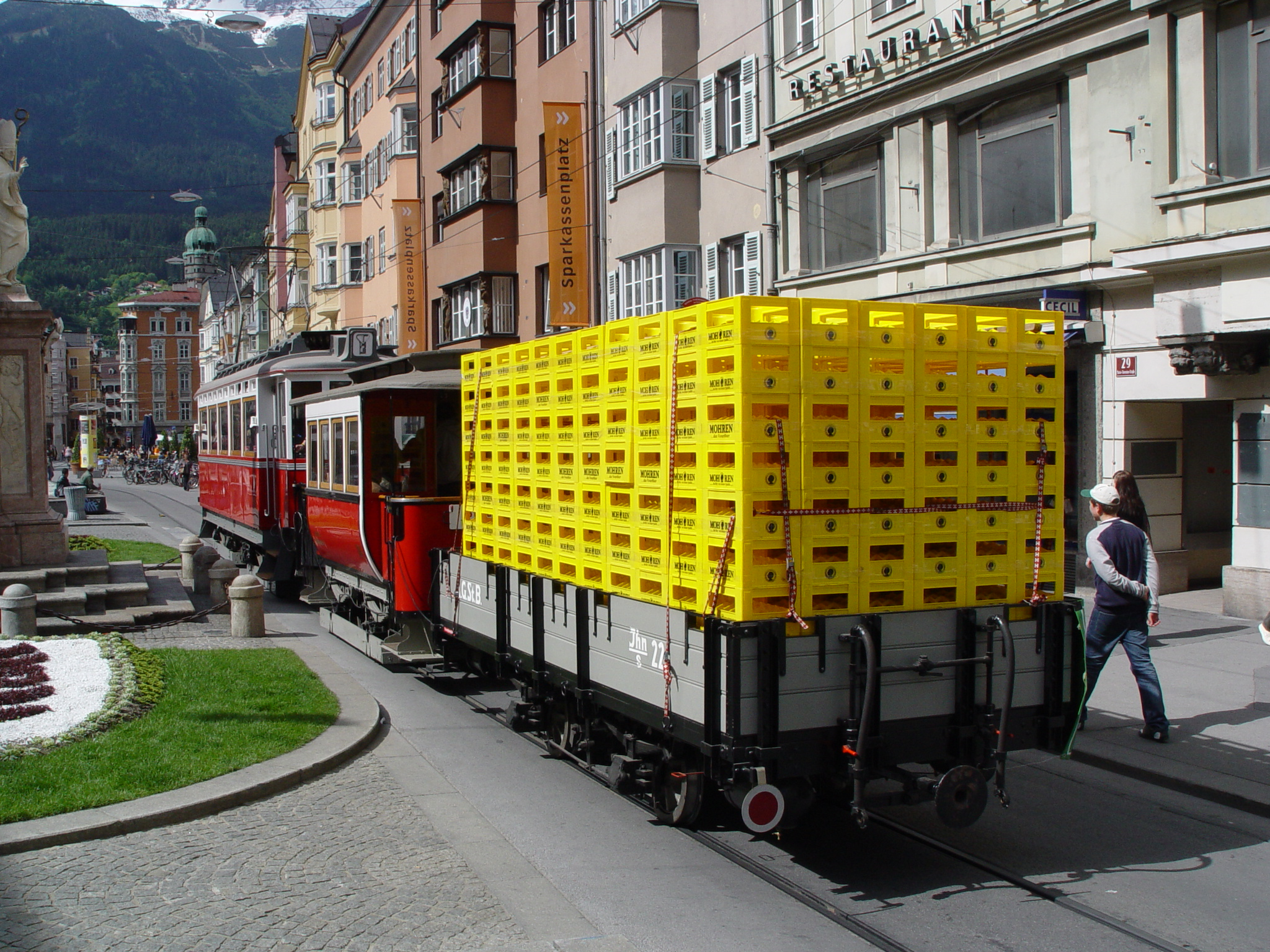 Triebwagen 1 der Localbahn Innsbruck–Hall i. Tirol, Beiwagen 104 der Innsbrucker Mittelgebirgsbahn und Güterwagen 22 der Stubaitalbahn bei einer Sonderfahrt der Tiroler Museumsbahnen in der Maria-Theresien-Straße